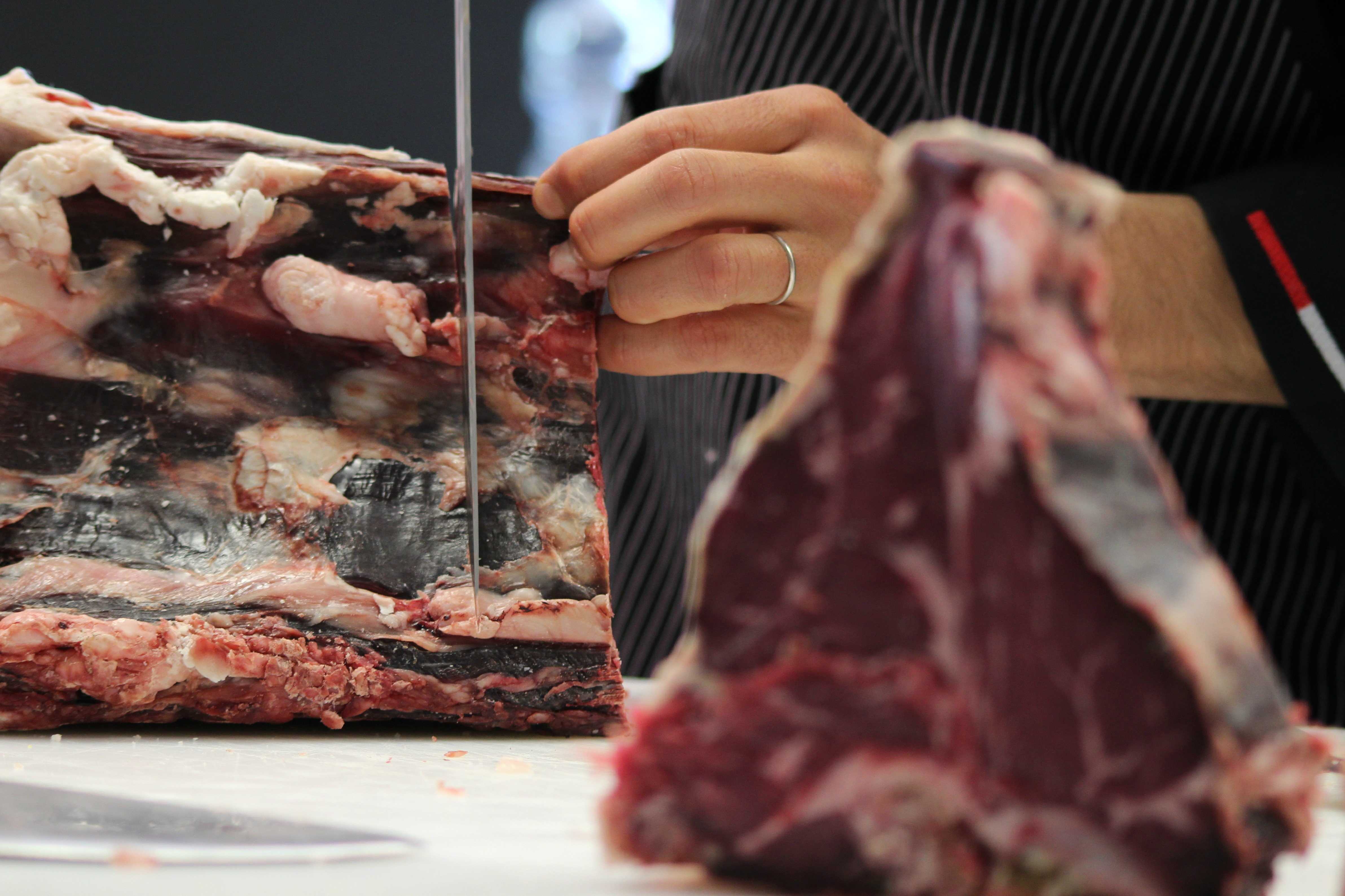 Dry Aged Meat